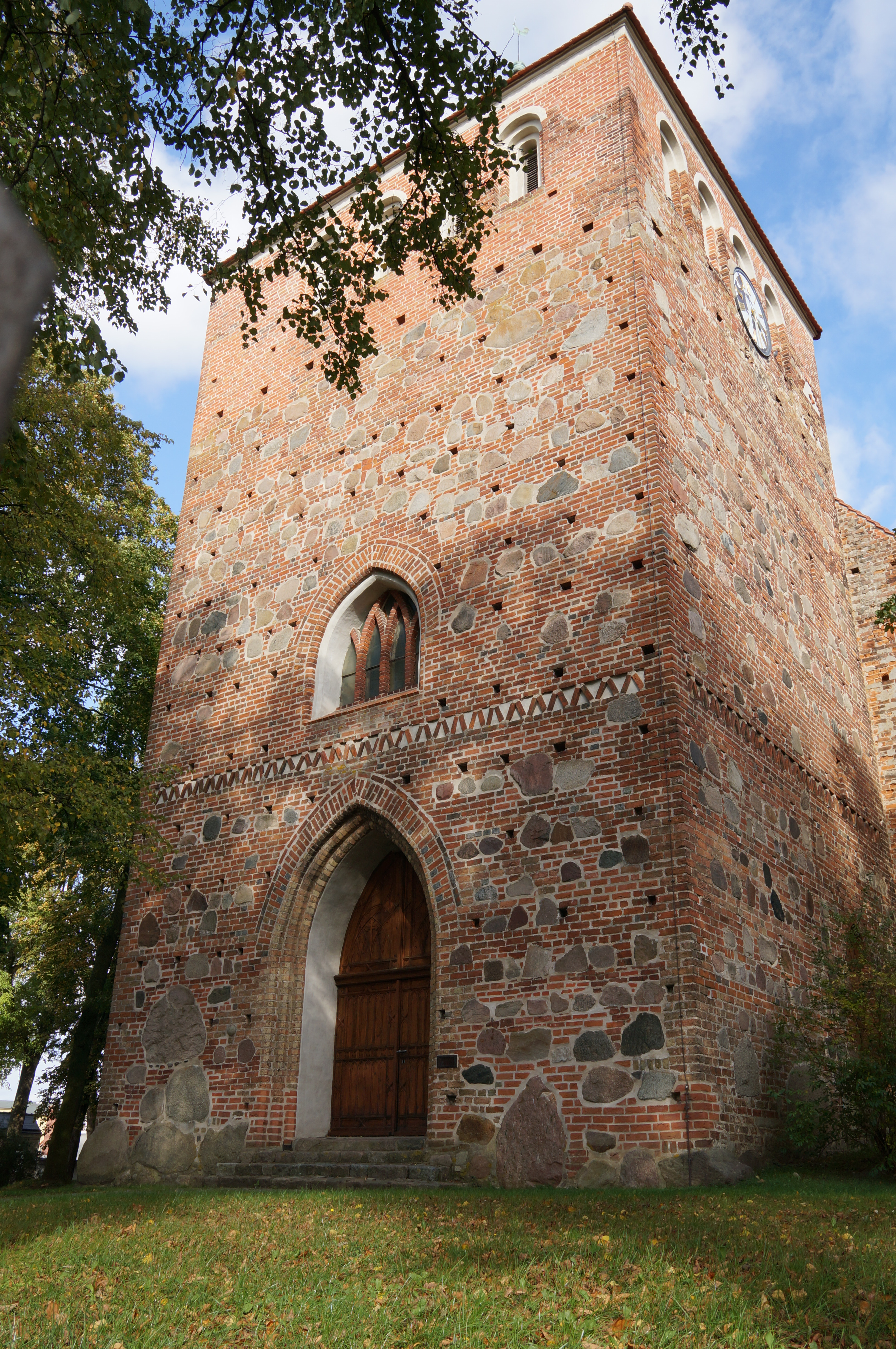 Kirche in Laage, 3-jochig, Backsteine und Feldsteine